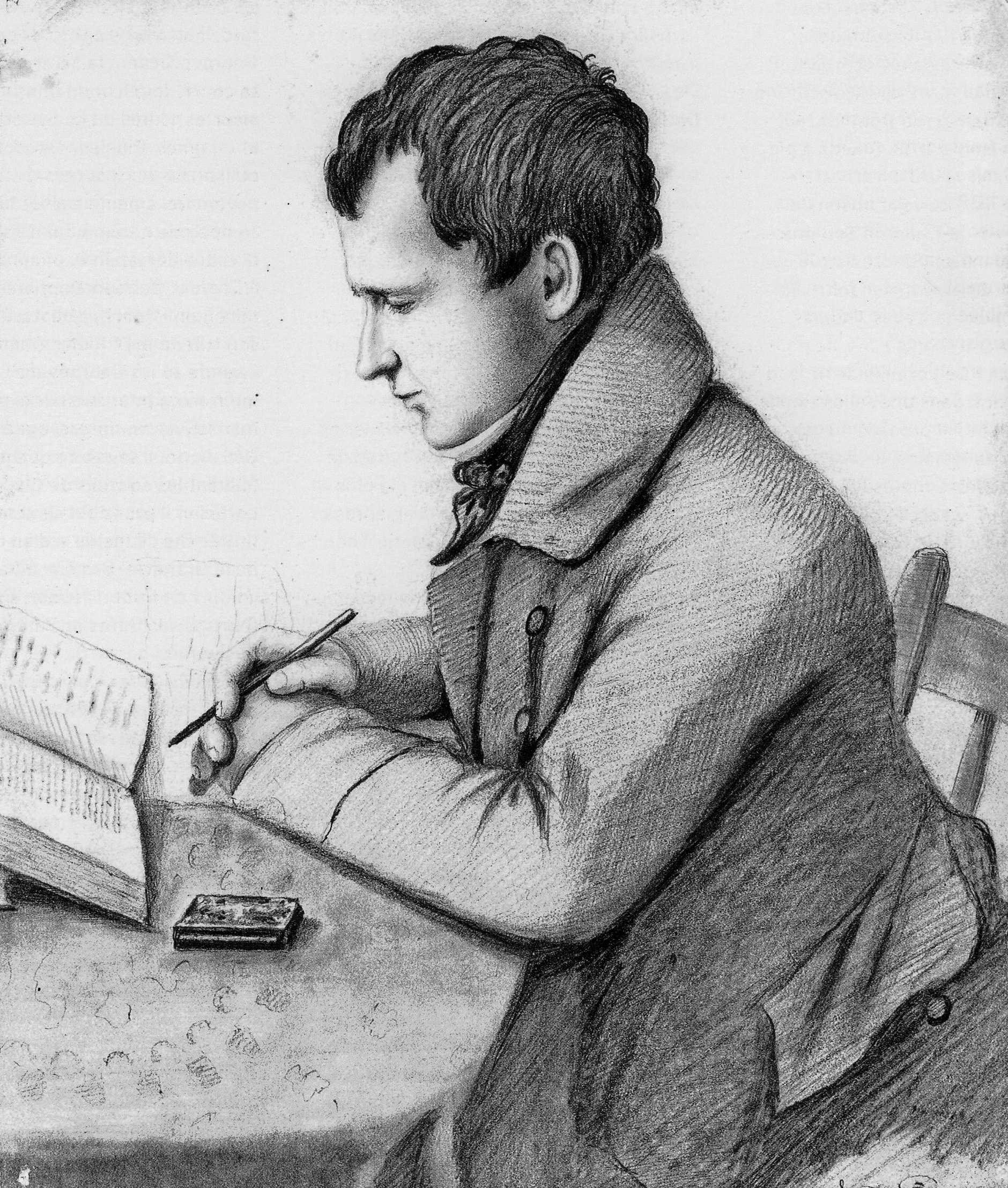 Portrait de François-Marie-Thomas Chevalier de Lorimier (1803-1839)